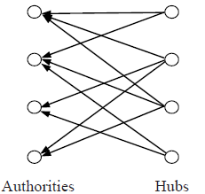 hitss